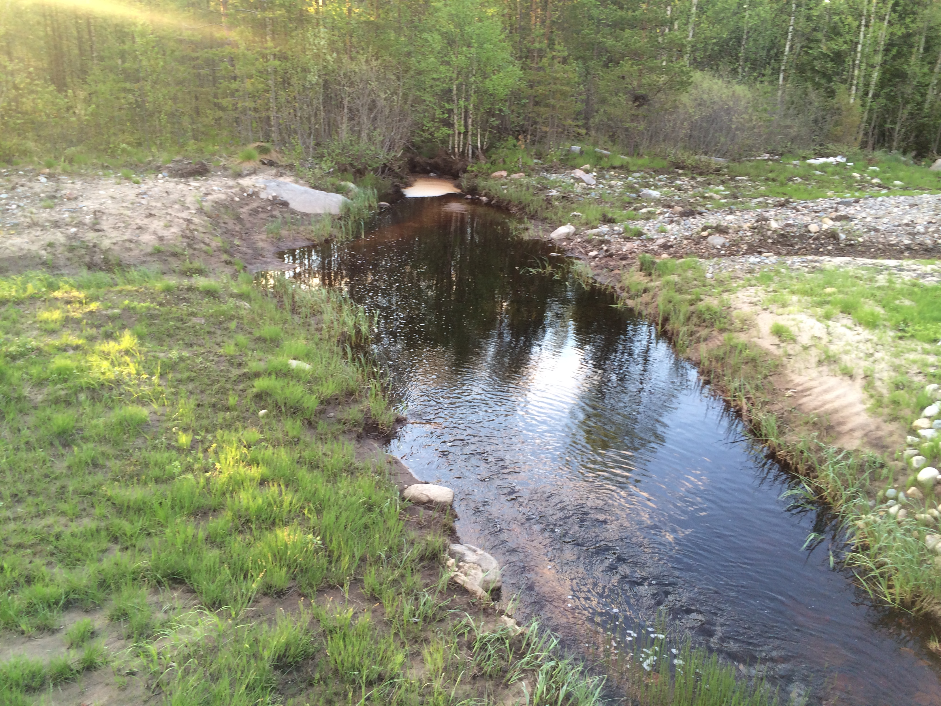 Ретинручей